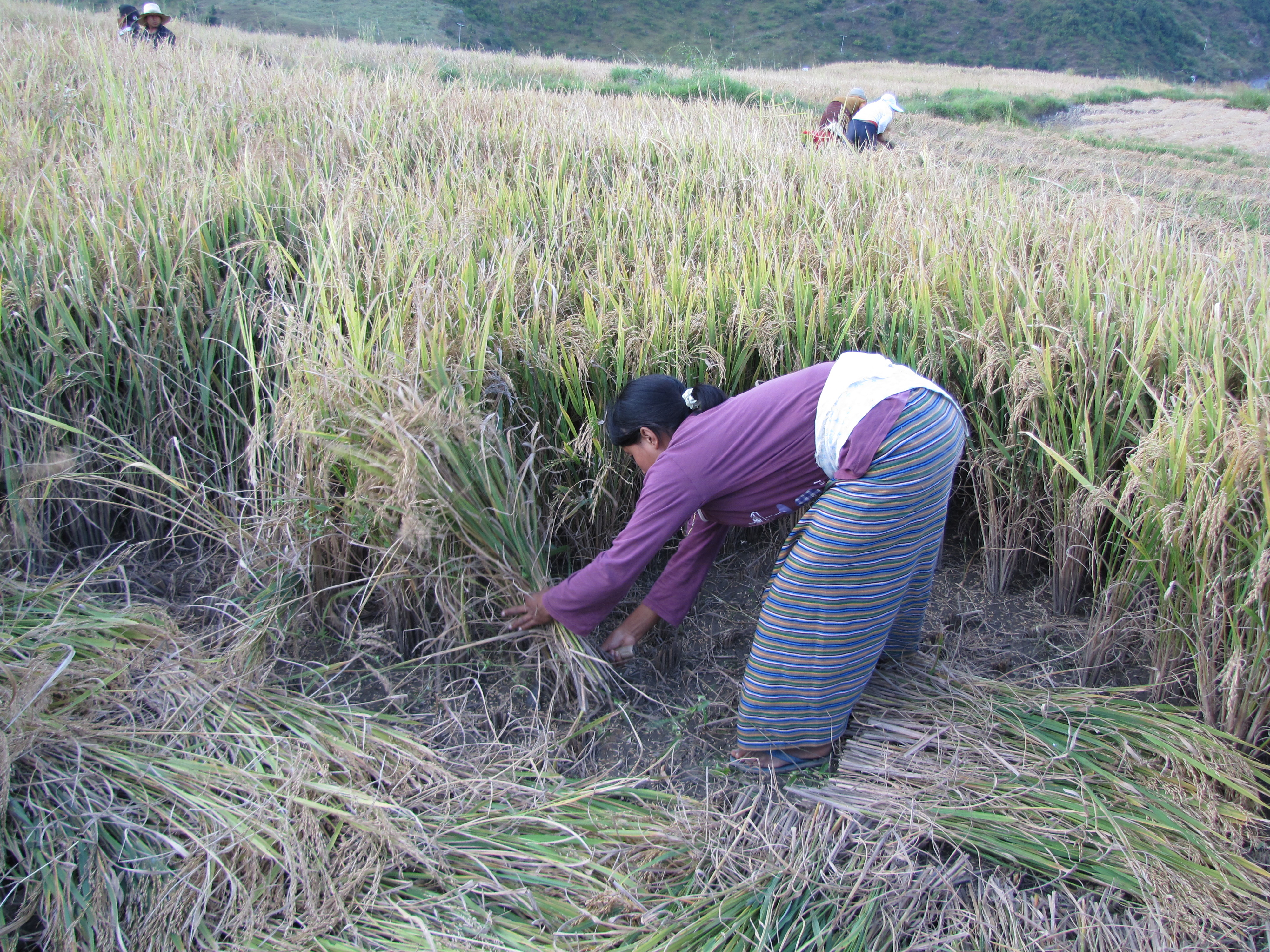 Bhutan View